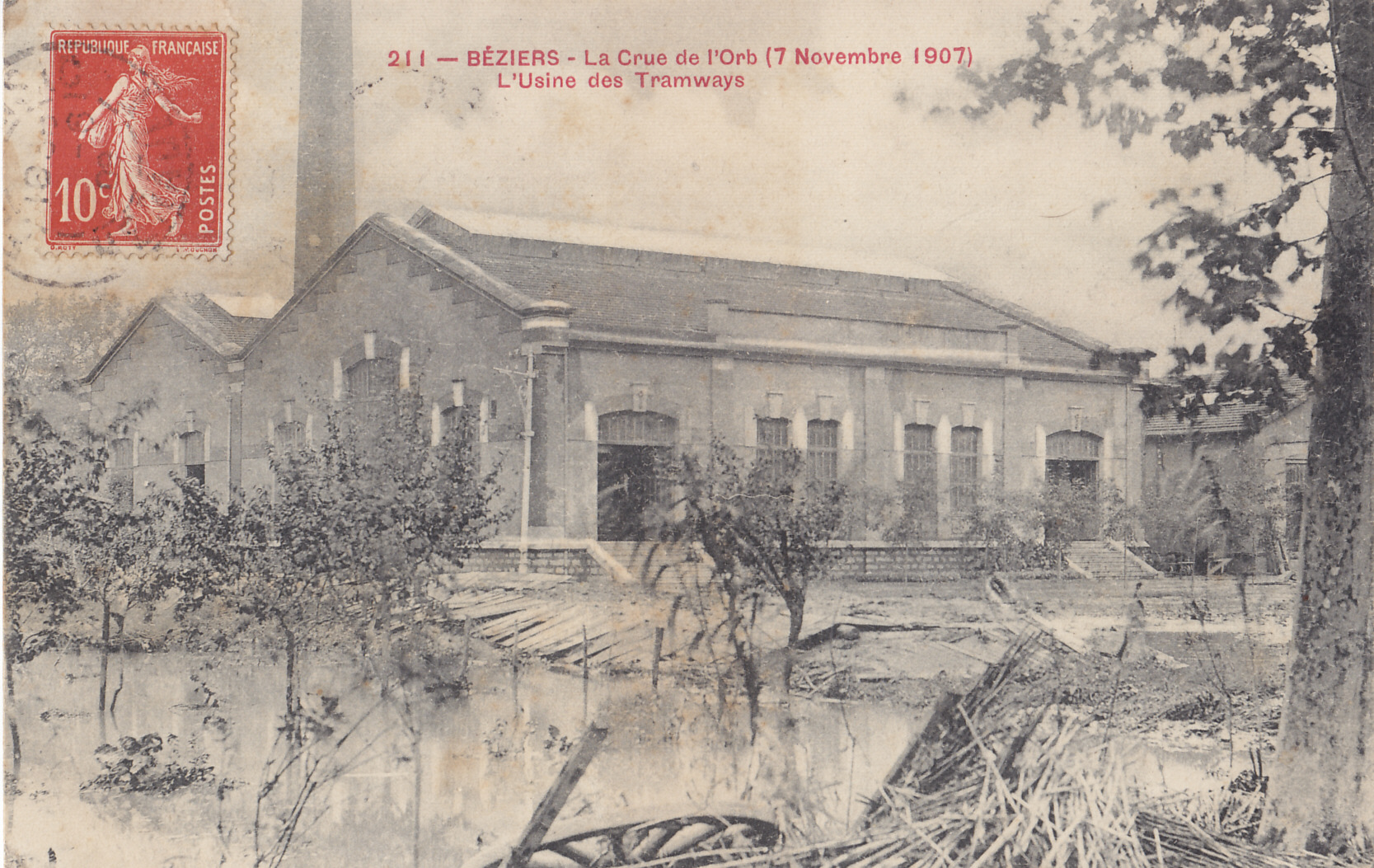 Carte postale sans mention d'éditeur, n°211 :BEZIERS - La crue de l'Orb (7 novembre 1907) - L'Usine des Tramways